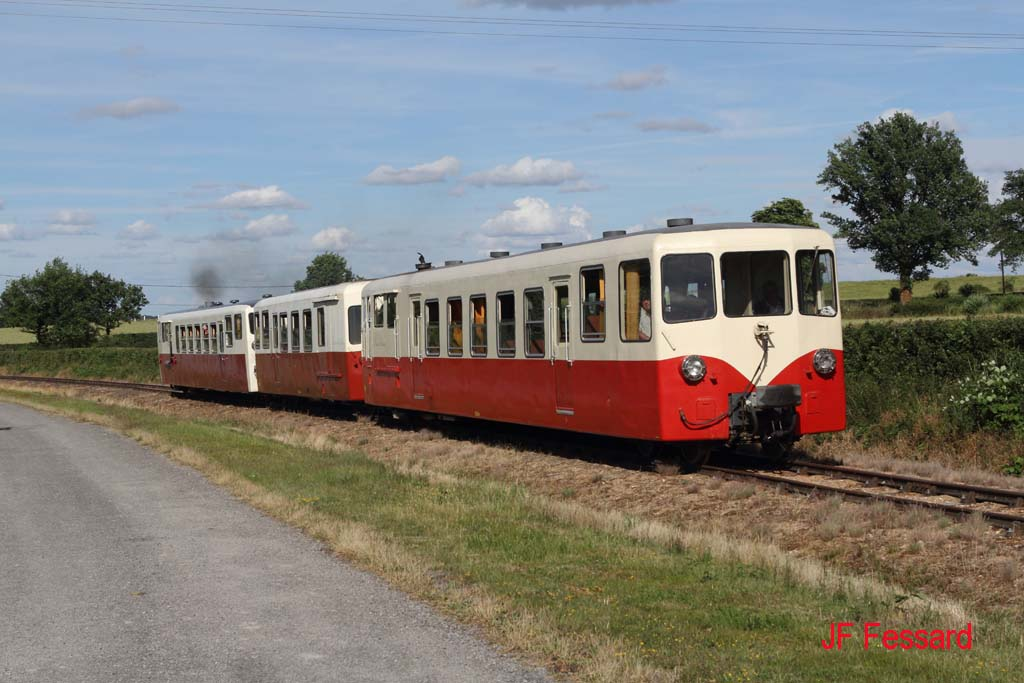 X224 X211 La Foulquetiére 21062015